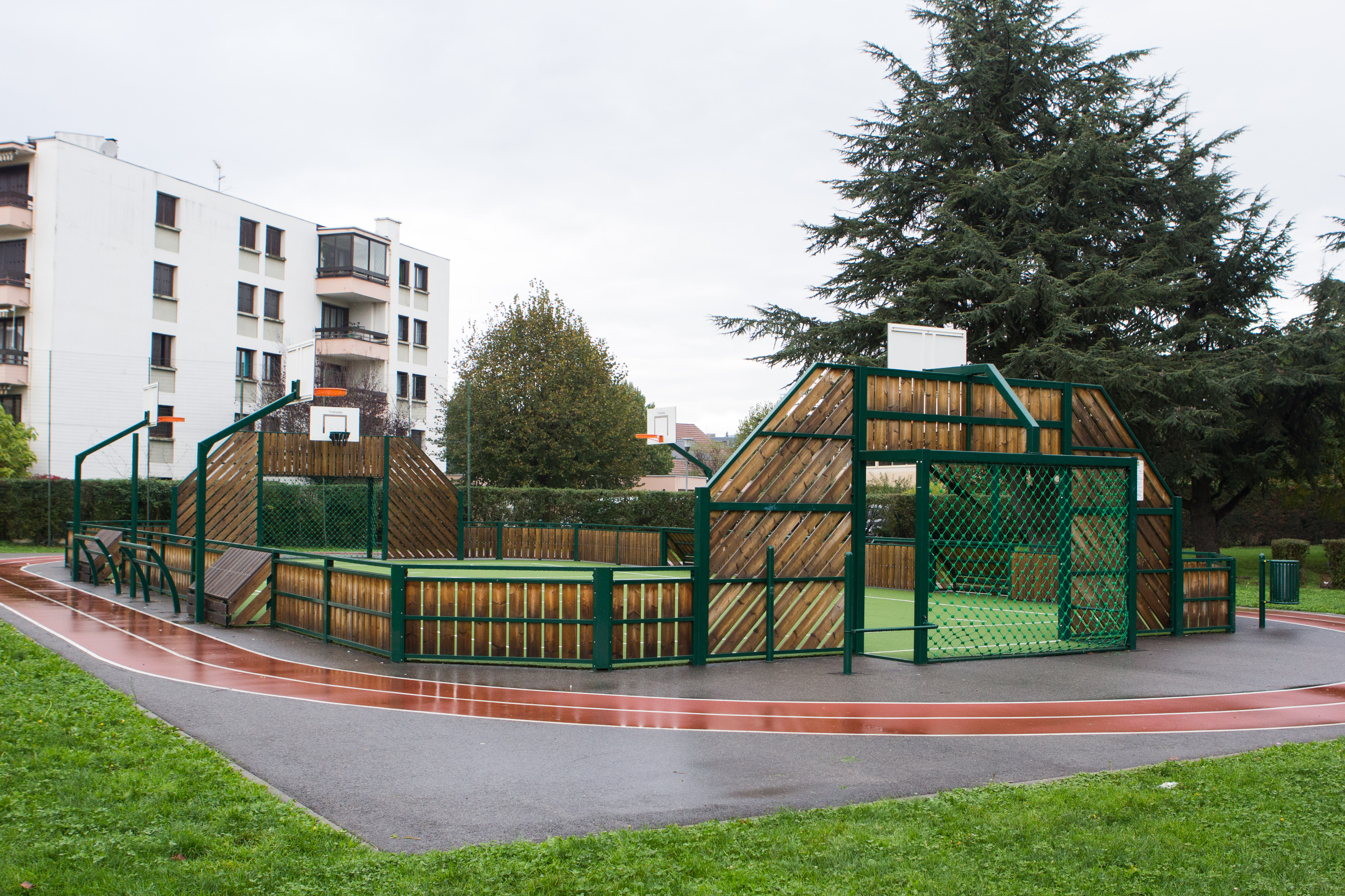 Terrain multisports, intersecrion rue Taillefer - avenue de Chamrousse / Rives, Isère, France